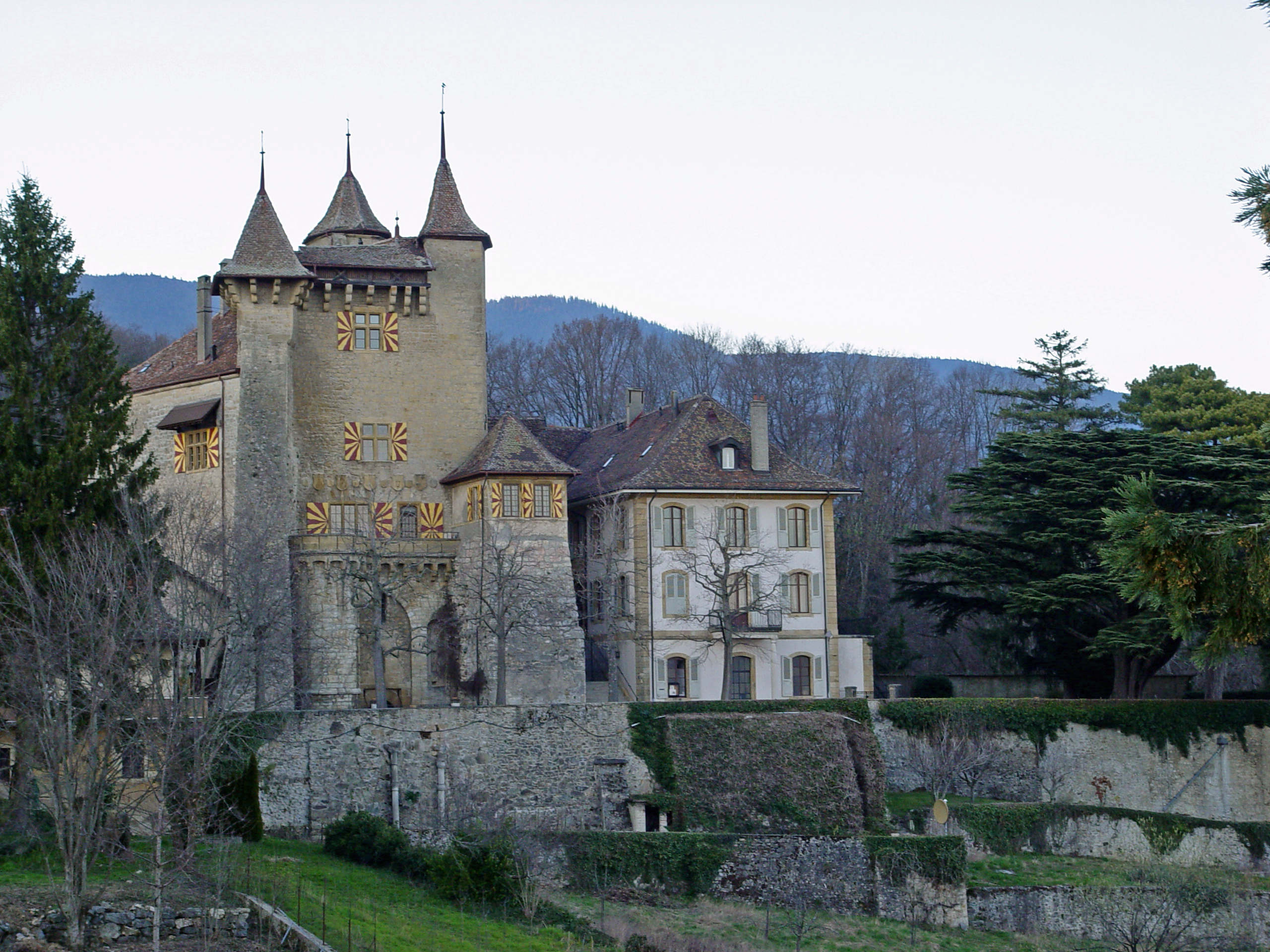 Vaumarcus, Schloss